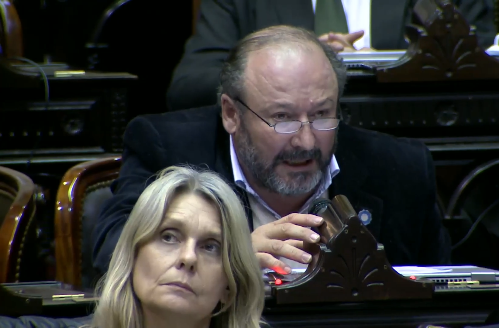 Daniel Kroneberger, diputado de la Nación Argentina por la provincia de La Pampa (2005-2009, 2011-2019), durante el debate sobre la Ley de Interrupción Voluntaria del Embarazo, junio de 2018.